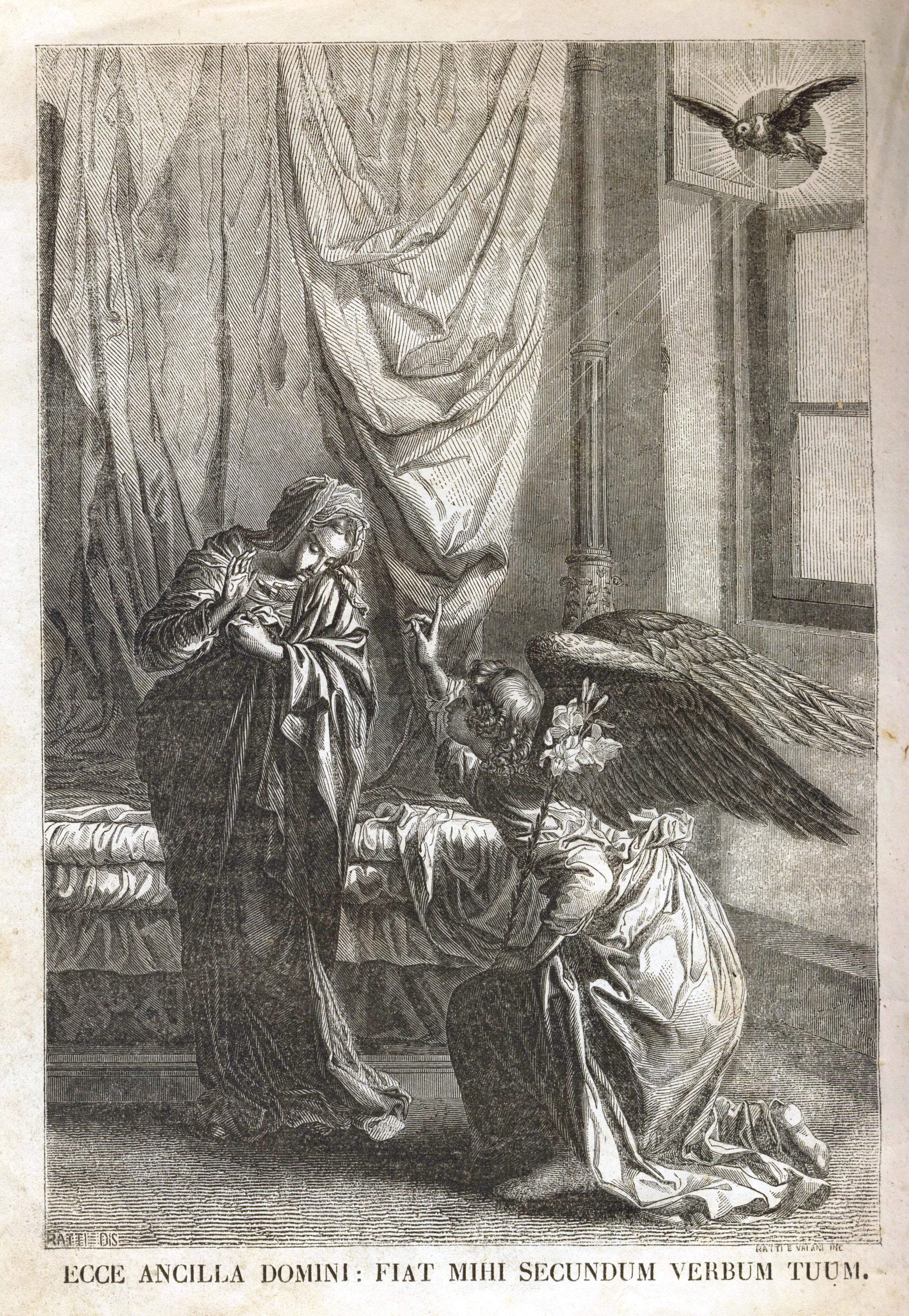 Giovanni Agostino Ratti (1666- 1755) - Annunciazione. Incisione da "Officio della Beatissima Vergine Maria da leggersi dalle Compagnie Secolari - Torino 1849.